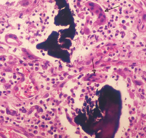 Infiltrat inflamatori portal. Microscopi òptic. 200X. Tinció: H&E.